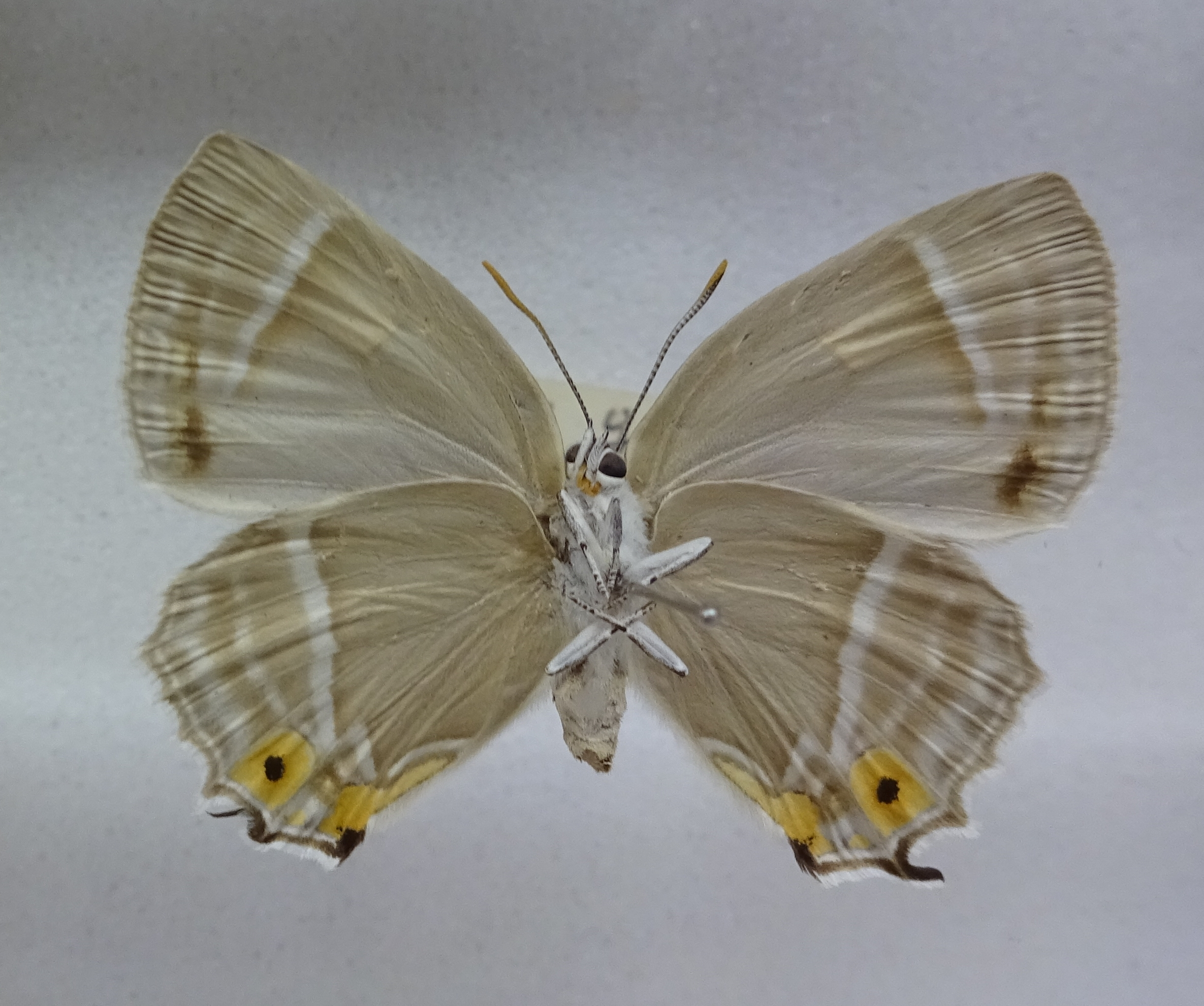 ハヤシミドリシジミ